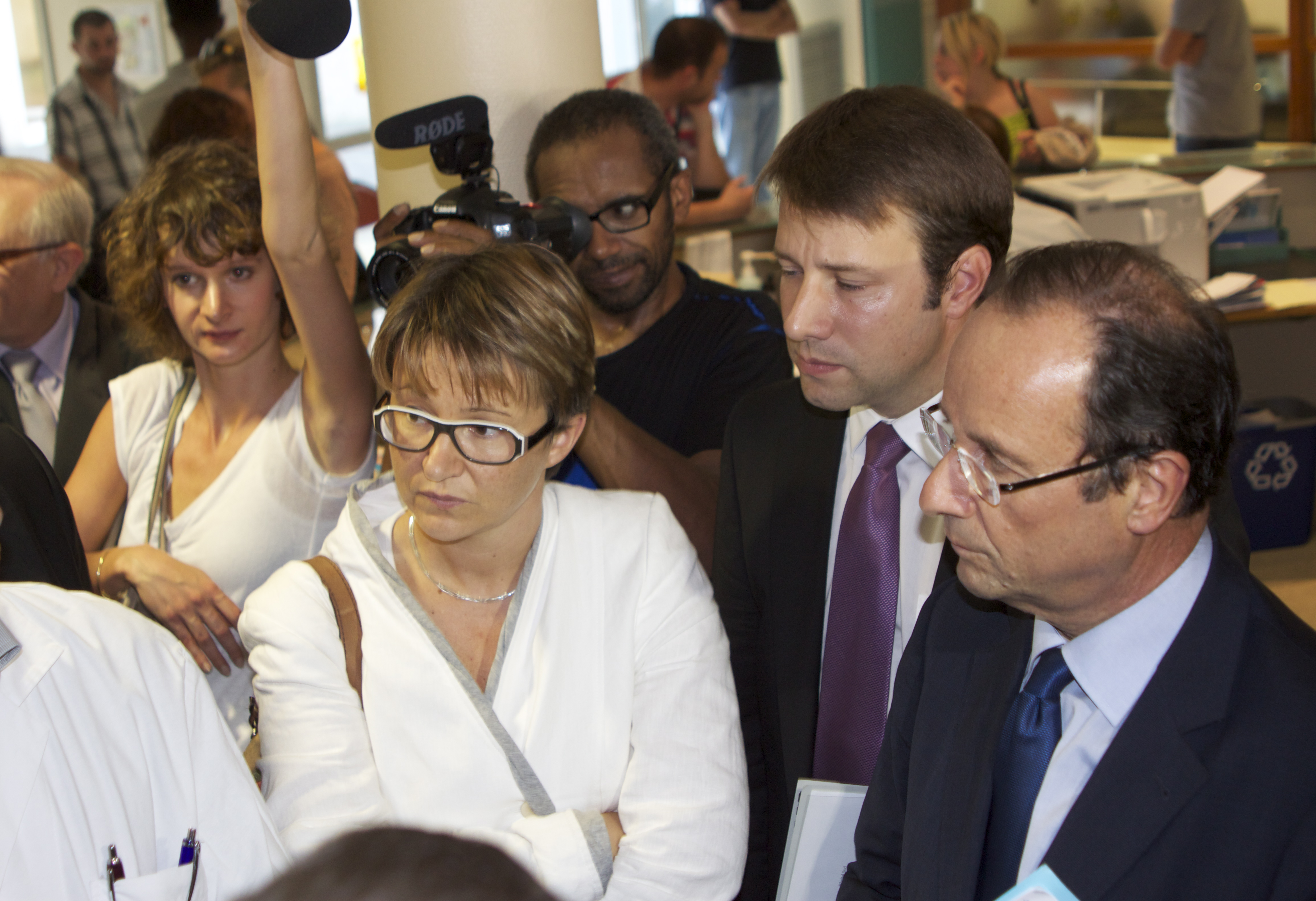 Venue François Hollande à Rennes le 27 septembre 2011. Visite de l'unité pédiatrique du CHU de Rennes. Sur la photo : François Hollande, Nathalie Appéré, Loïg Chesnais-Girard